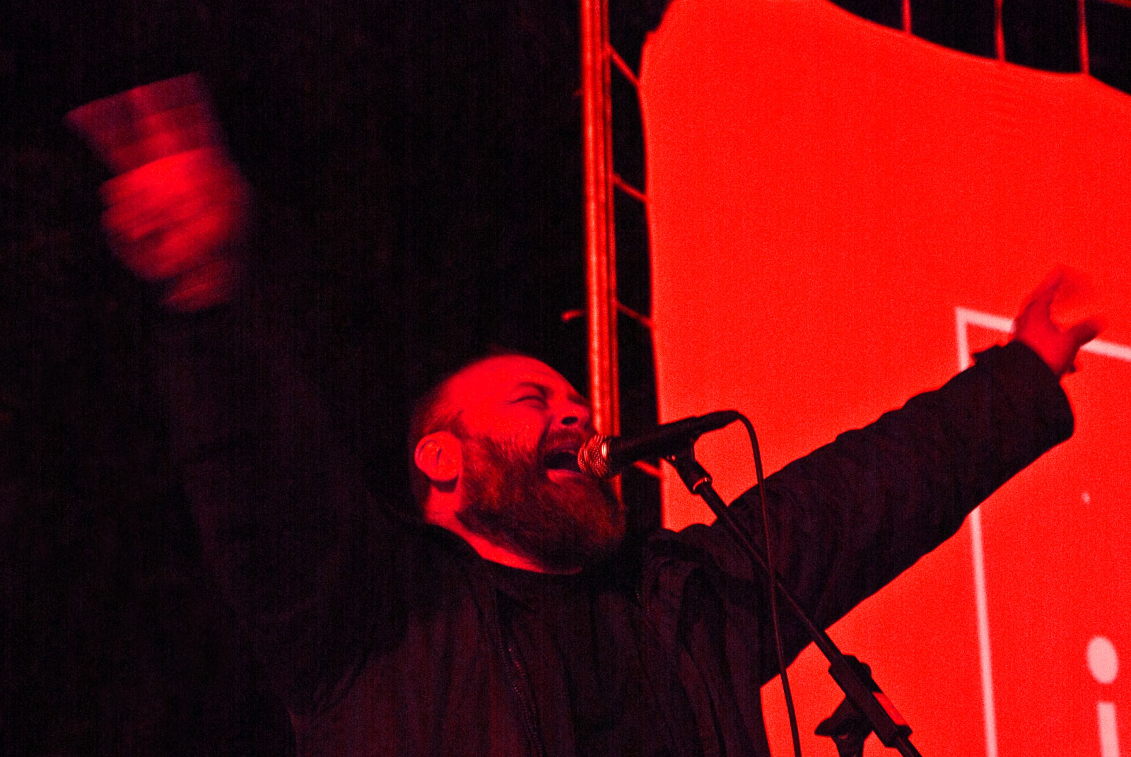 Певач Бјесова Зоран Маринковић на концерту у Горњем Милановцу, 3. мај 2008, снимио Ранко Томић